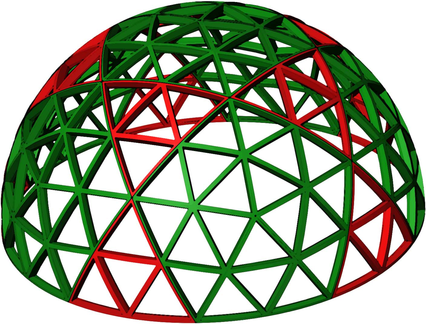 Diseño de un Medio Domo de Frequencia 4 basado en el Icosaedro